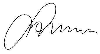 Автограф Аслана Масхадова